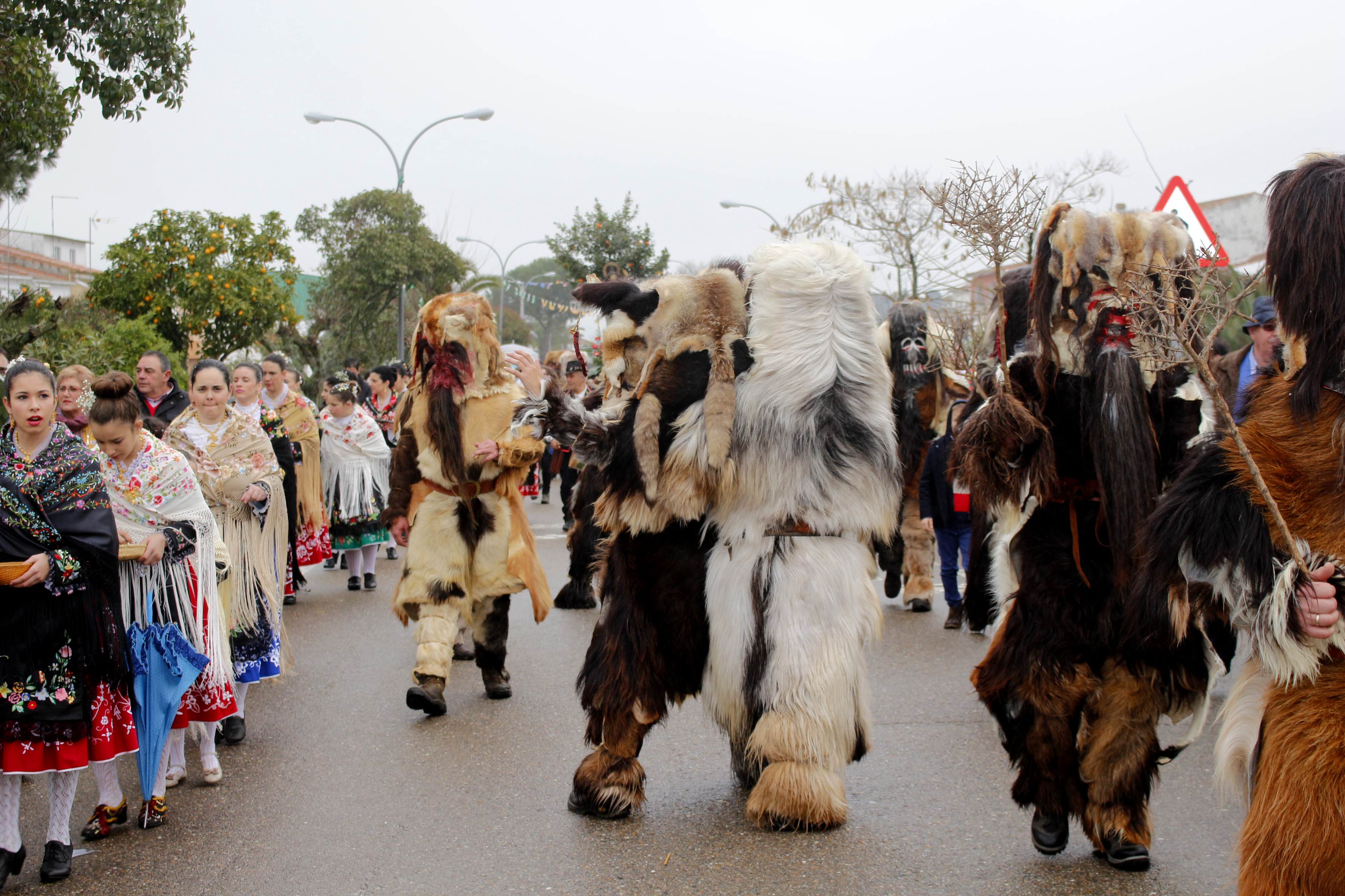 Año 2016.